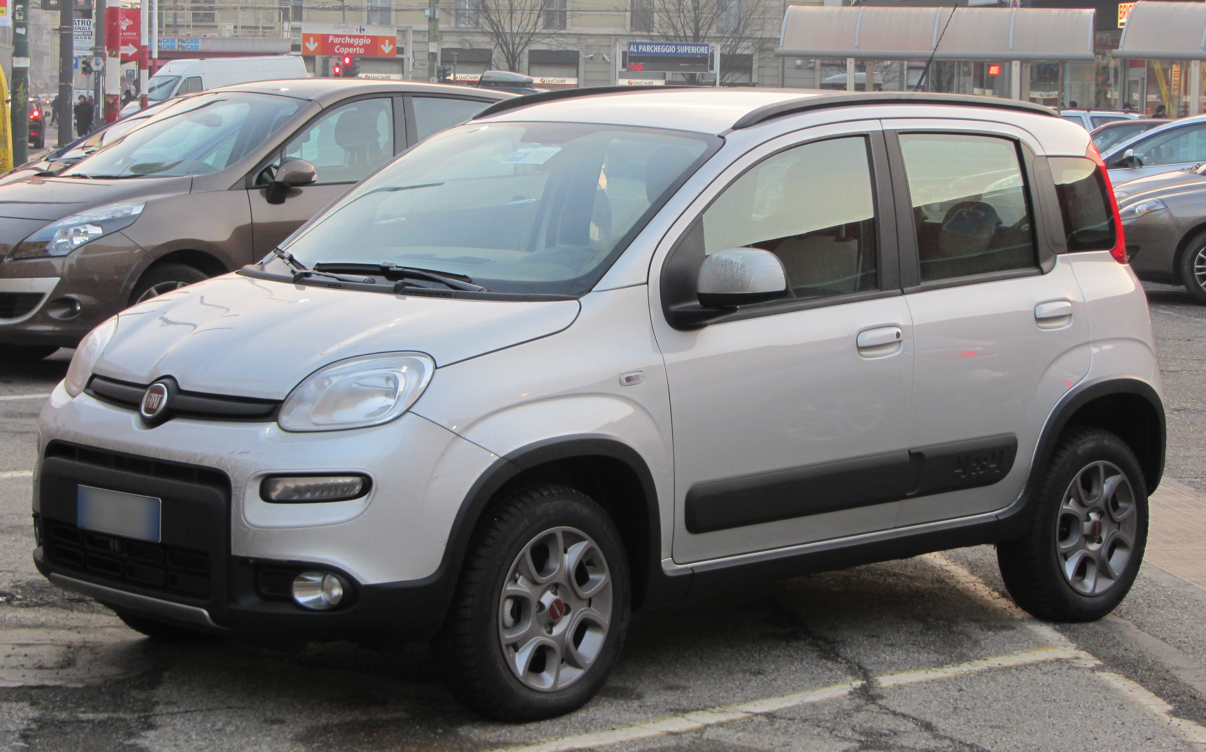 Una Fiat Panda terza serie (MK3 - 2011) 4x4 a Milano